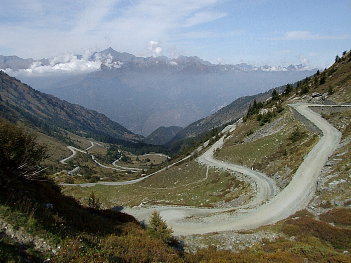 Colle delle Finestre Picture taken by user Idéfix , september 10, 2006